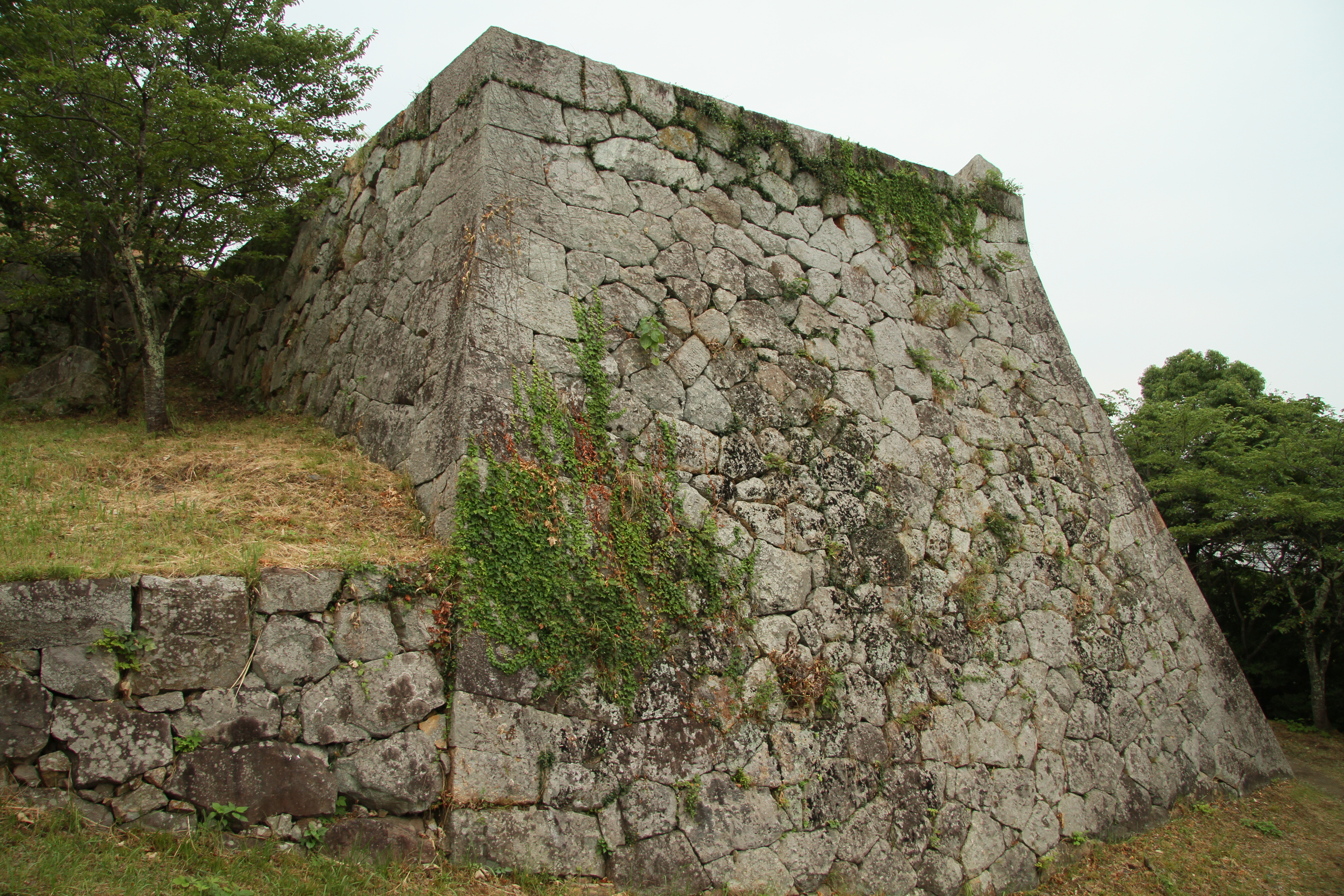 米子城の副天守台石垣